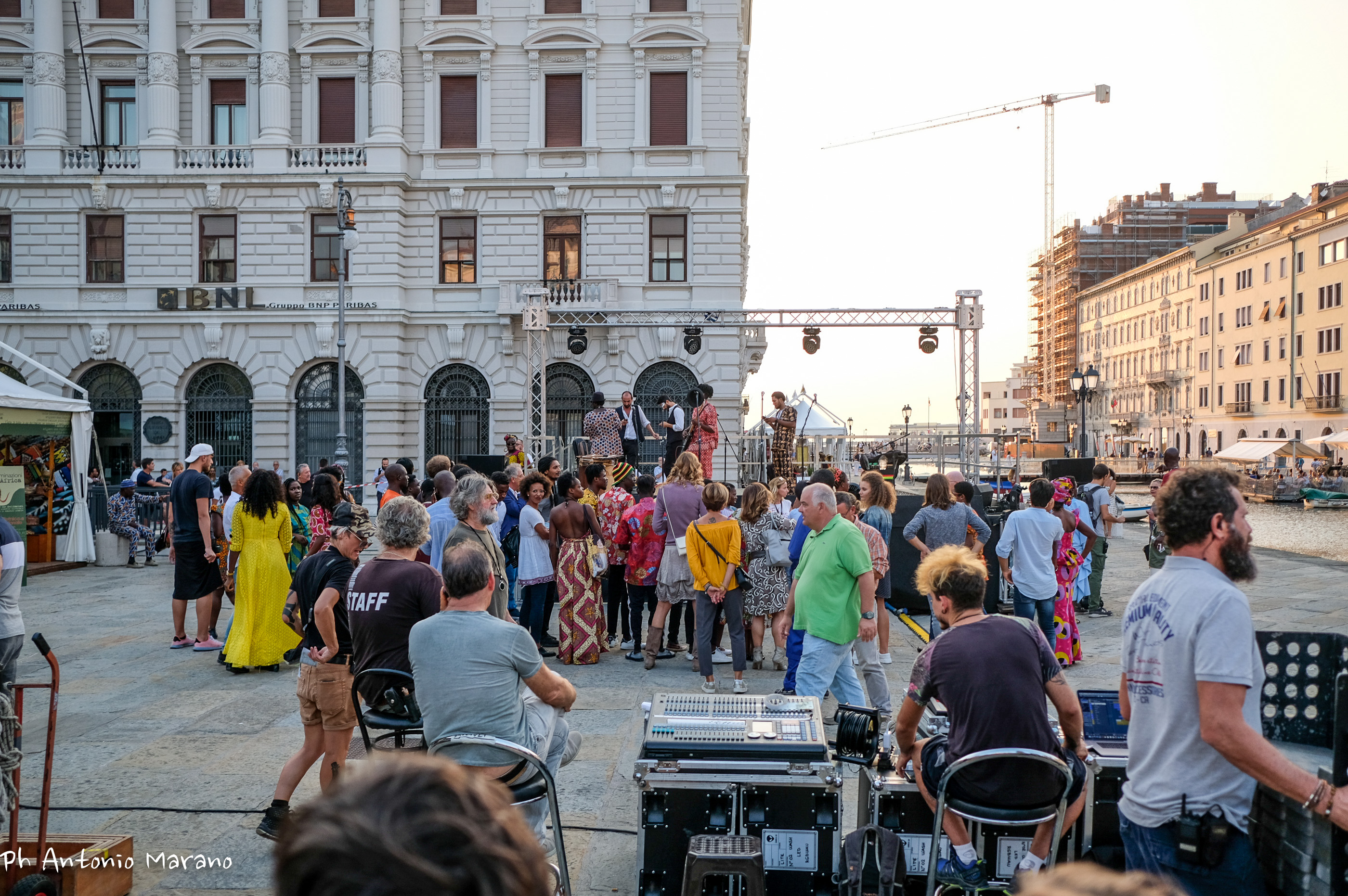 Set cinematografico del film Tolo Tolo di Checco Zalone a Trieste